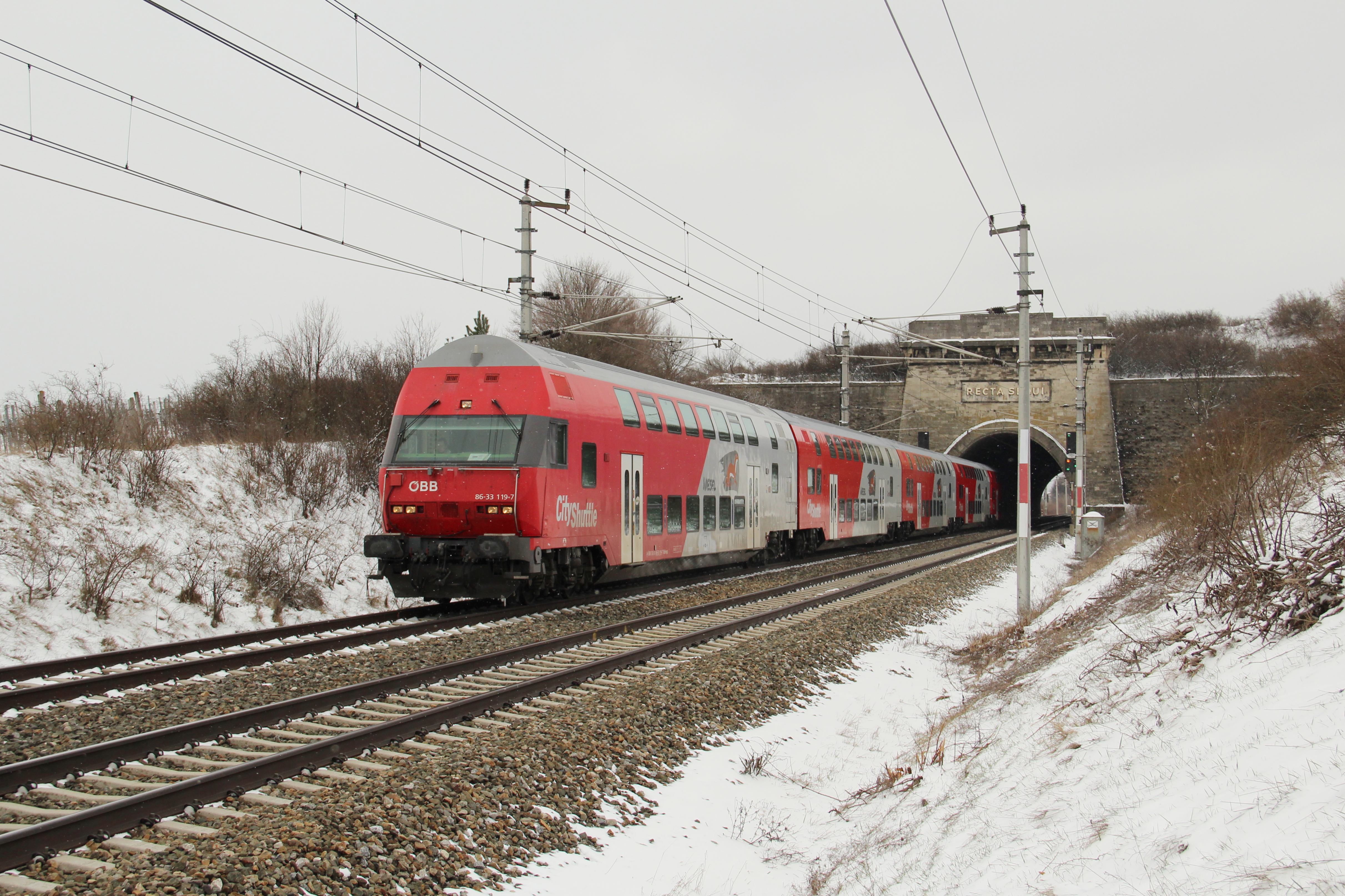 Ein für die Südbahn typischer Regionalzug, bestehend aus einer fünfteiligen Doppelstock-Wendezuggarnitur und einer schiebenden Lok der Baureihe ÖBB 1144, hier bei der Ausfahrt aus dem Busserltunnel bei Gumpoldskirchen Richtung Wien